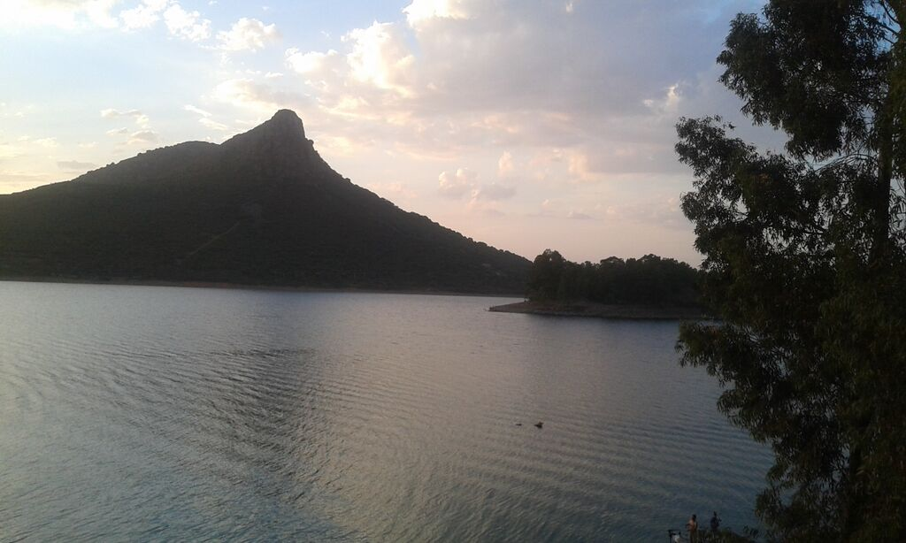 Diglago cxe Pelocxe